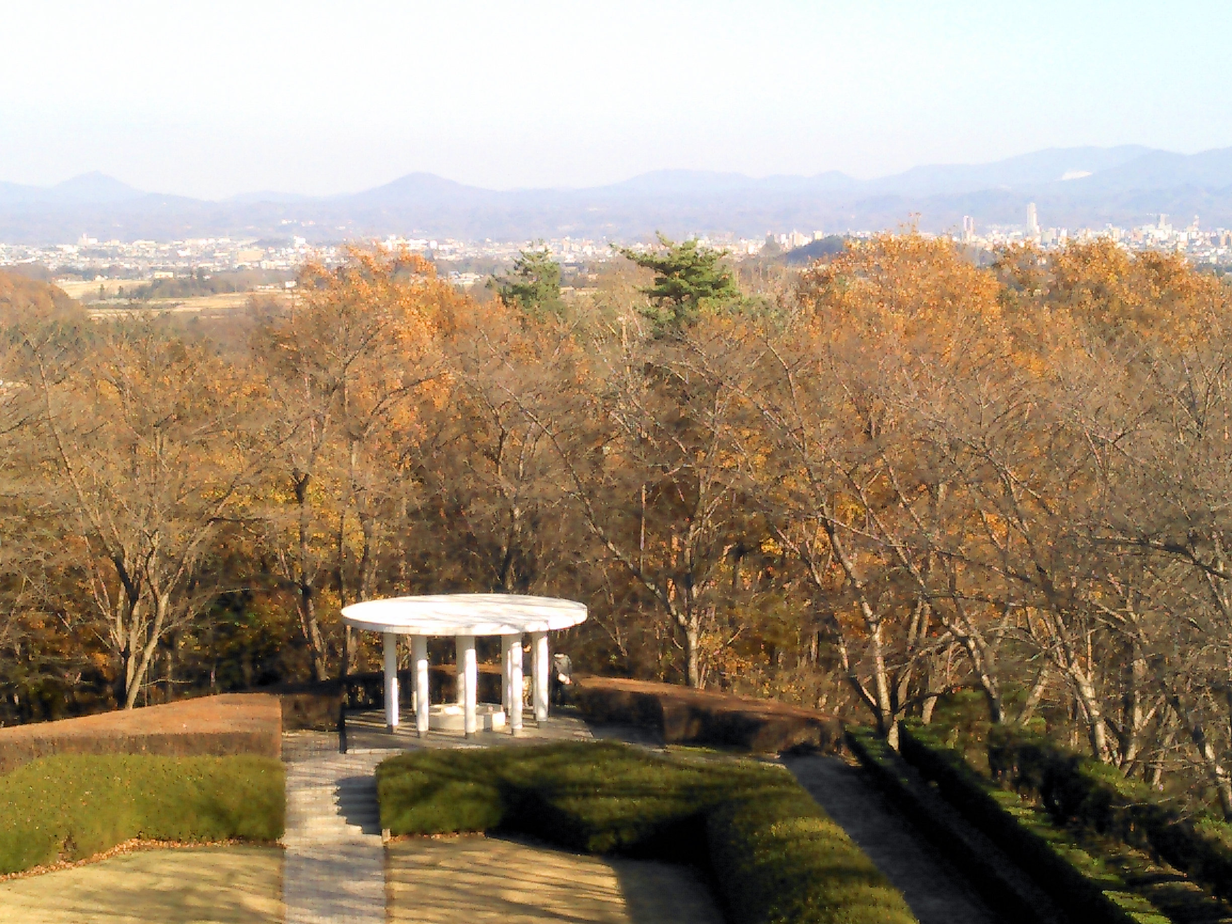 郡山市 逢瀬公園 展望台から郡山市街方向